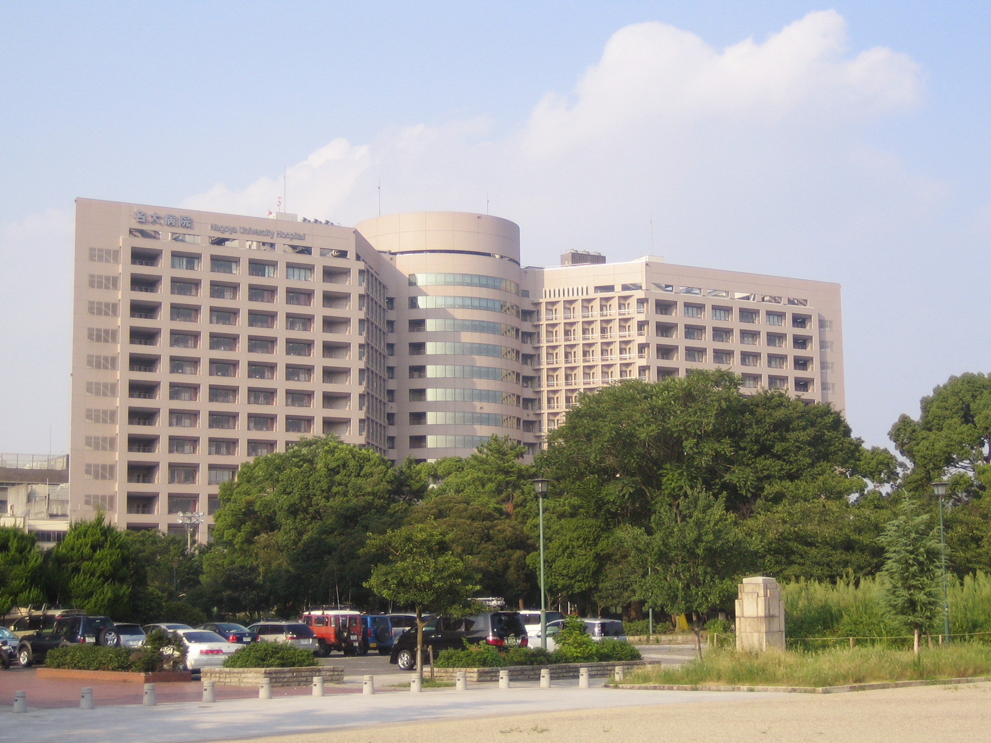 Nagoya University Hospital (名古屋大学医学部附属病院), in Nagoya, Aichi|Nagoya, Aichi, Japan